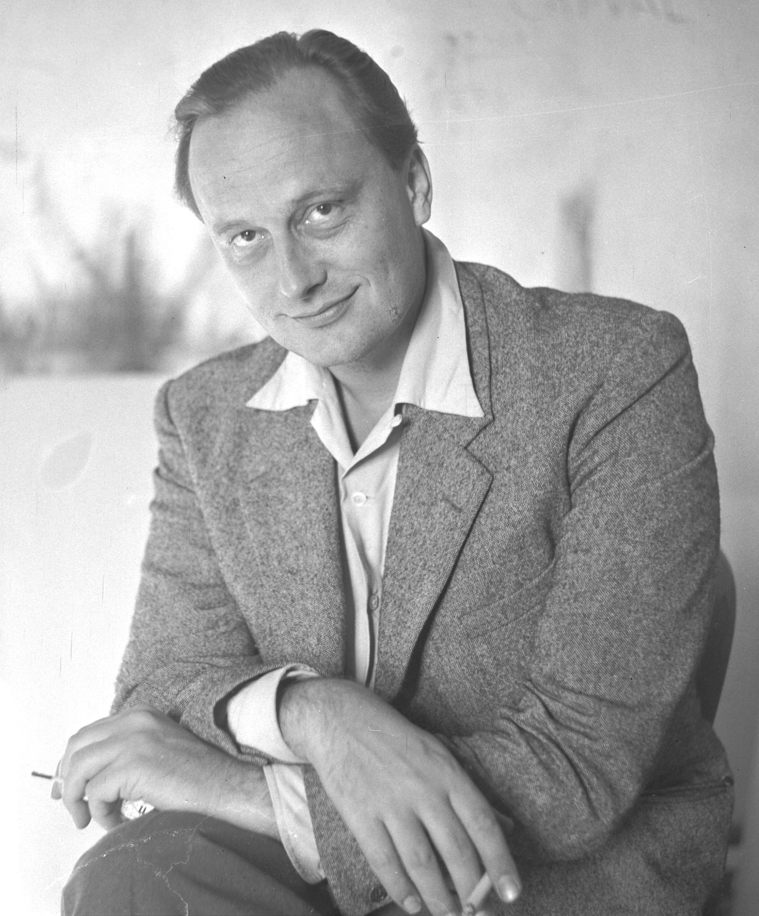 André Bjerke, norsk forfatter.